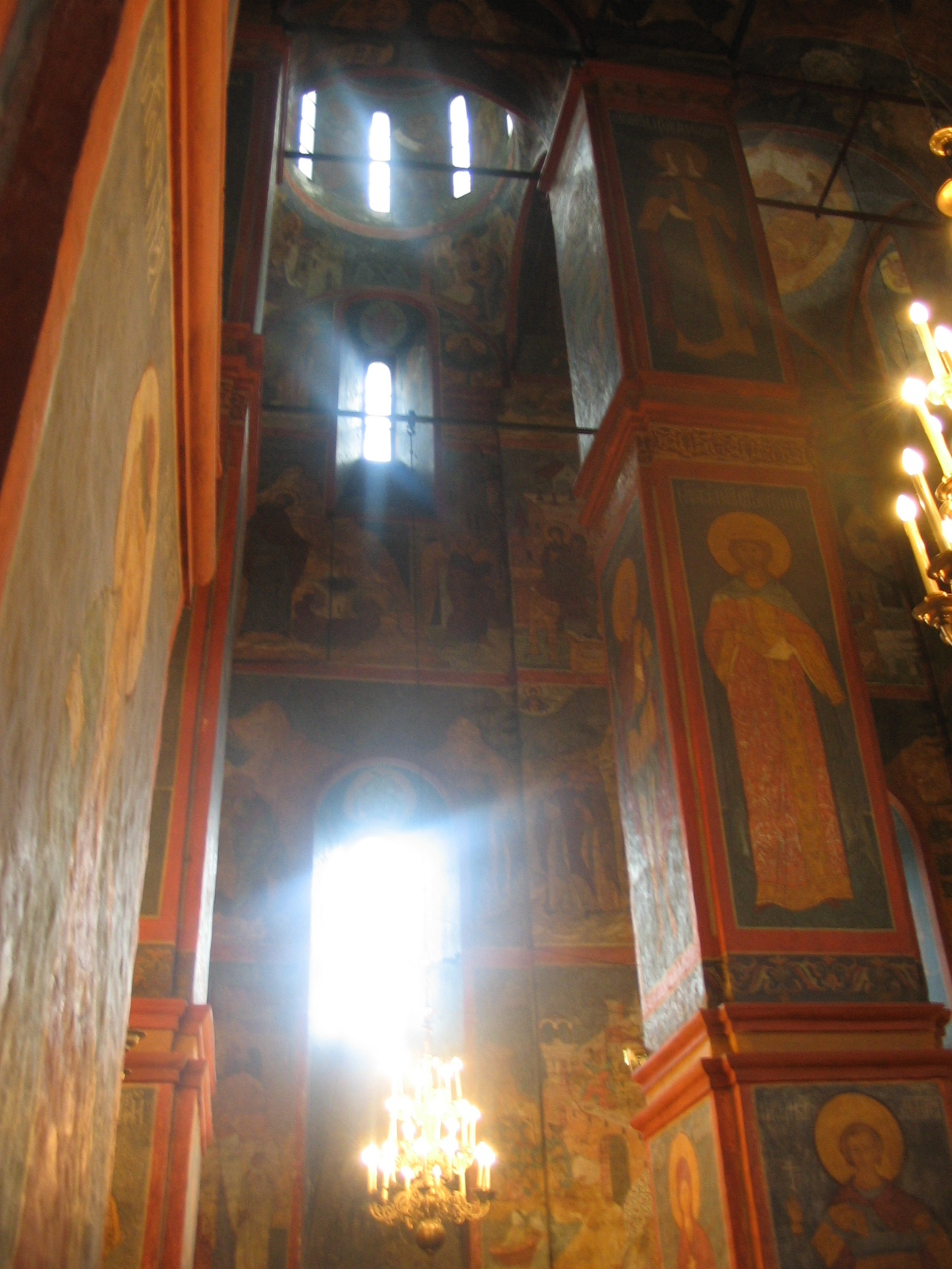 Фрески. Новодевичий монастырь